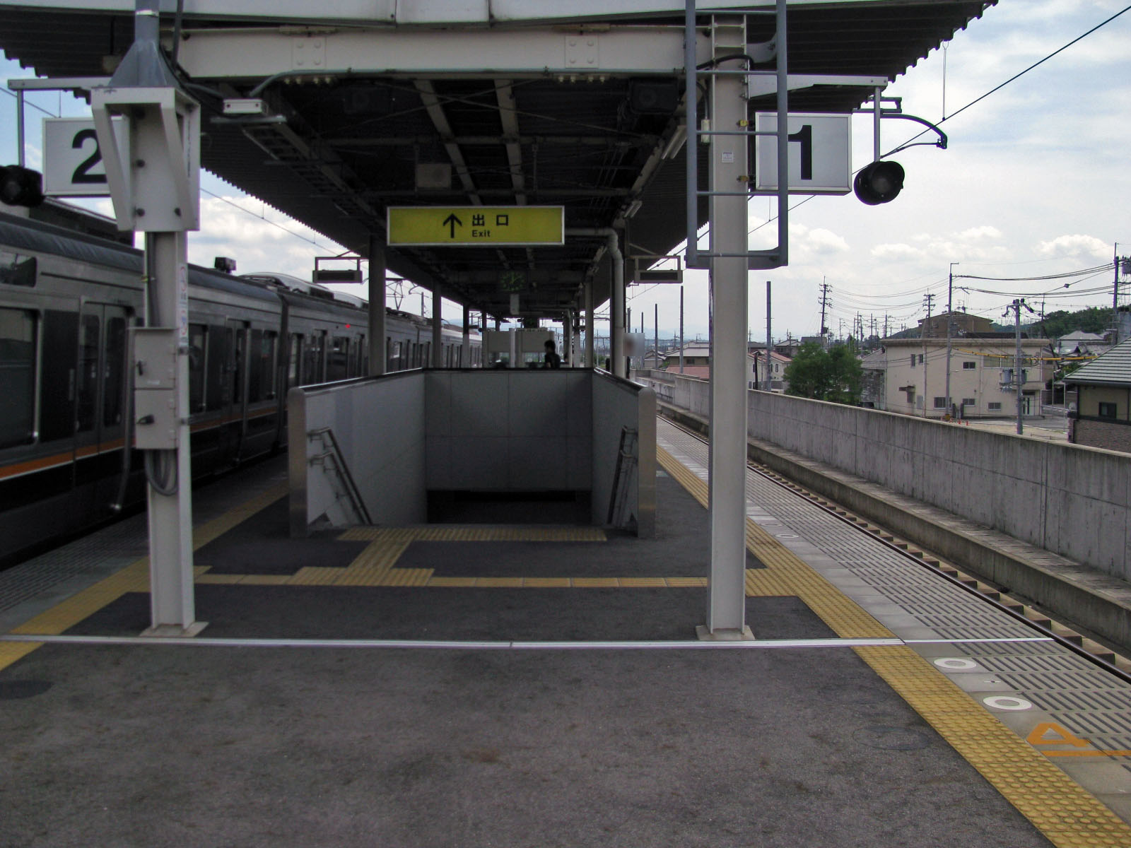 JR学研都市線同志社前駅